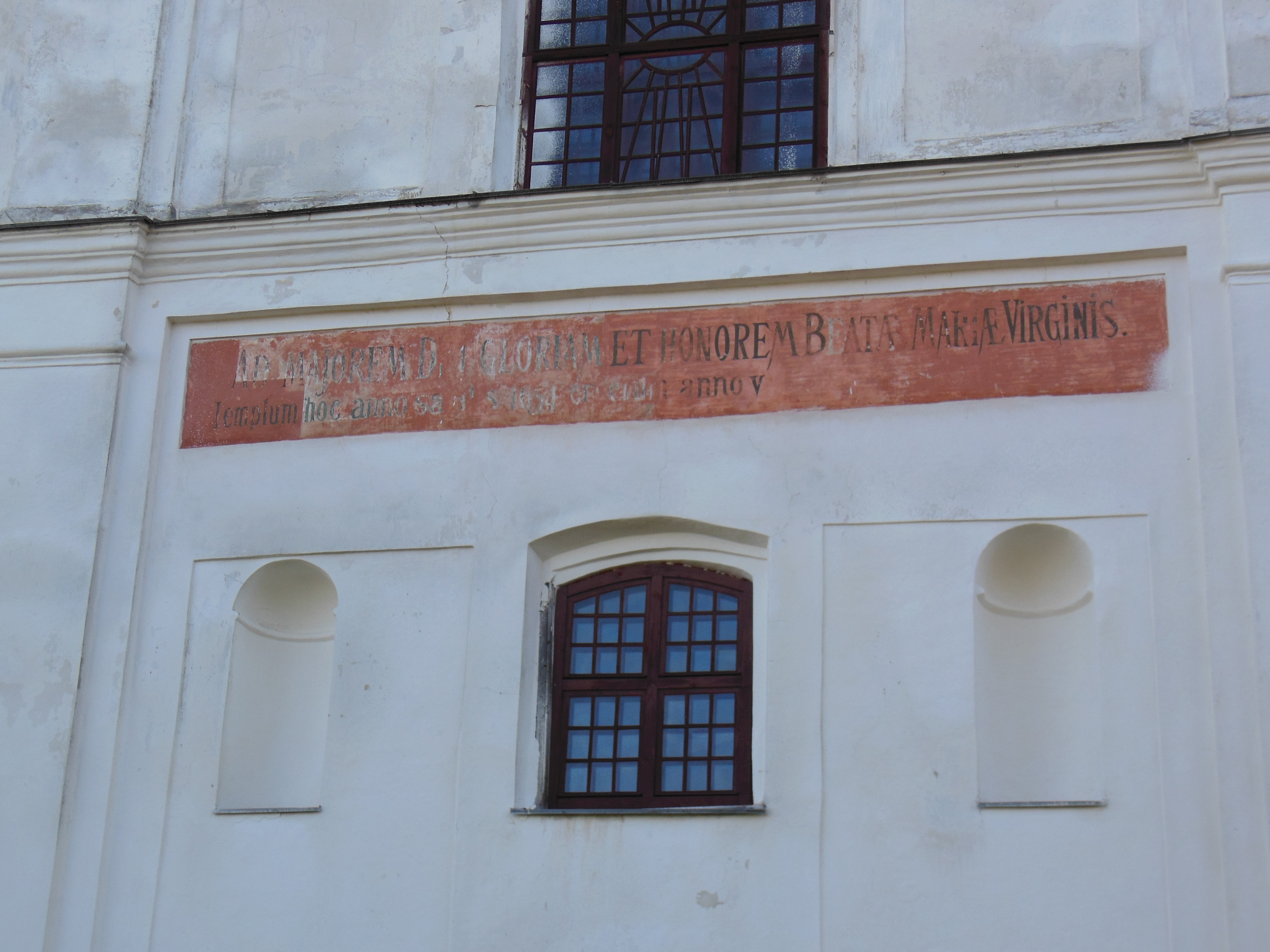 Беларуская (тарашкевіца): Успенскі касцёл з фрэскамі ў інтэр’еры брама кляштарны корпус. г. Амсьціслаў This is a photo of Belarusian heritage monument. Reference number: 511Г000504 ( WLM)